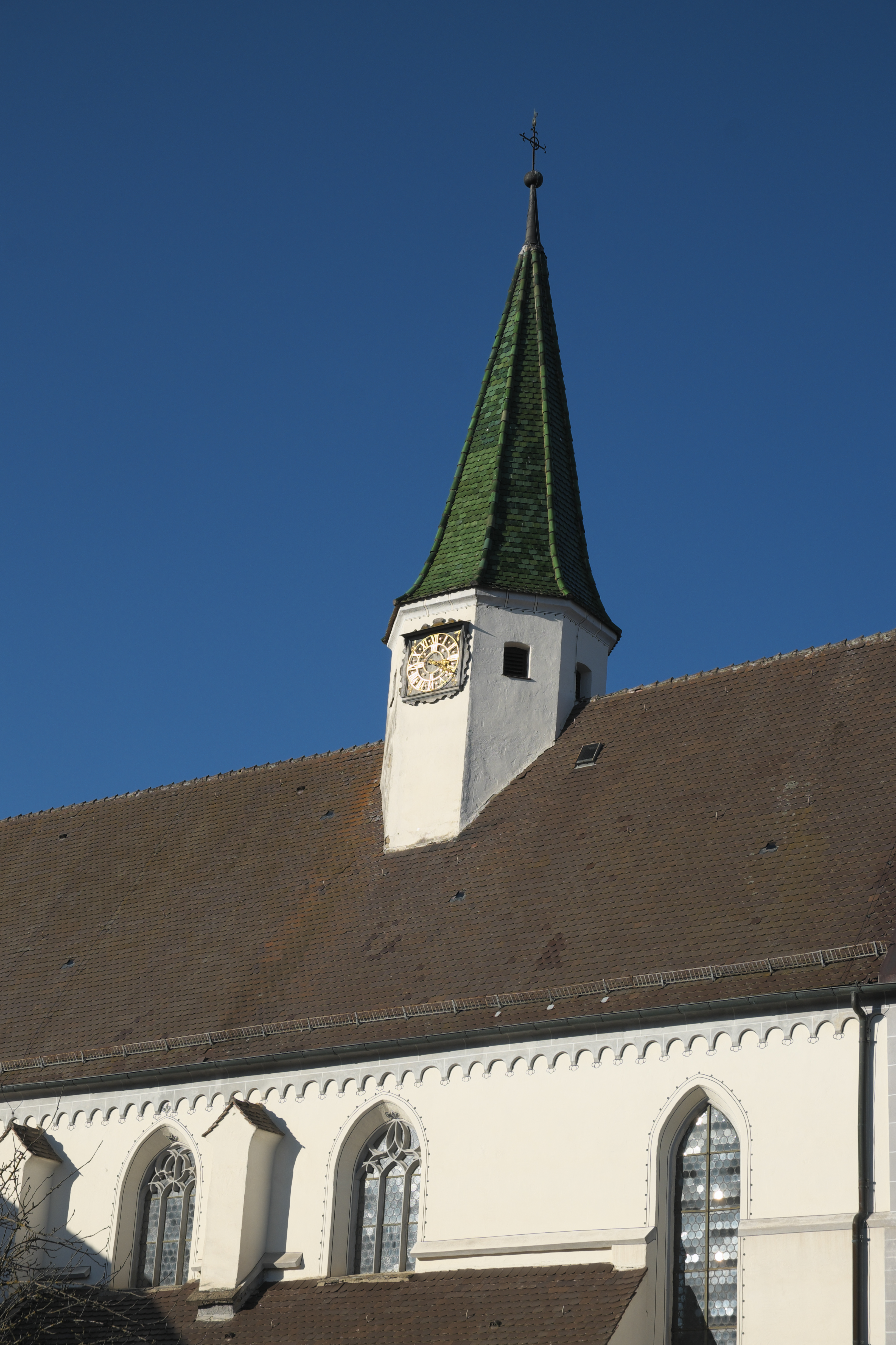 Katholische Pfarrkirche St. Anna, ehemalige Kirche des Zisterzienserinnenklosters in Heiligkreuztal (Altheim) im Landkreis Biberach (Baden-Württemberg/Deutschland), Dachreiter